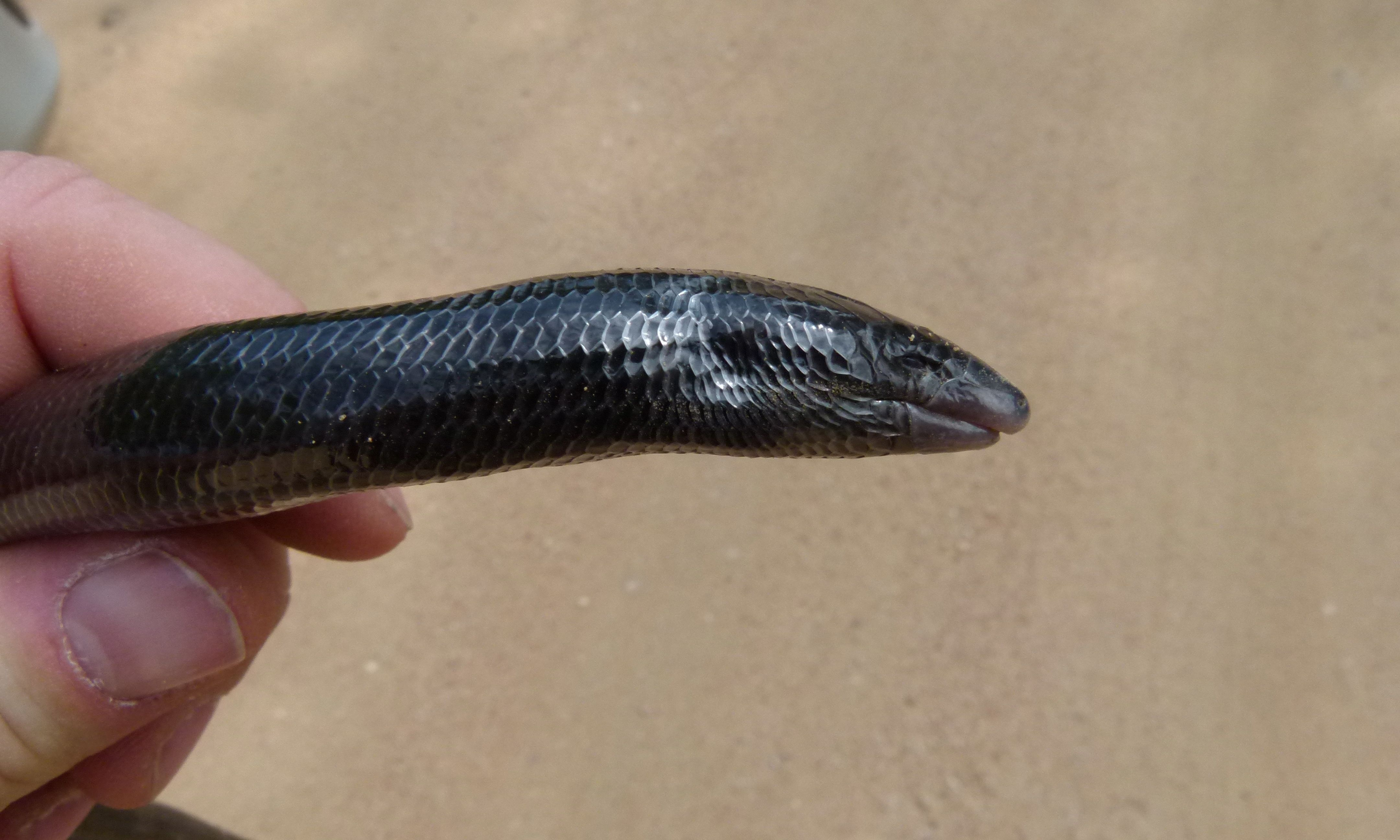 Parking at Lake Panic, Kruger NP, SOUTH AFRICA